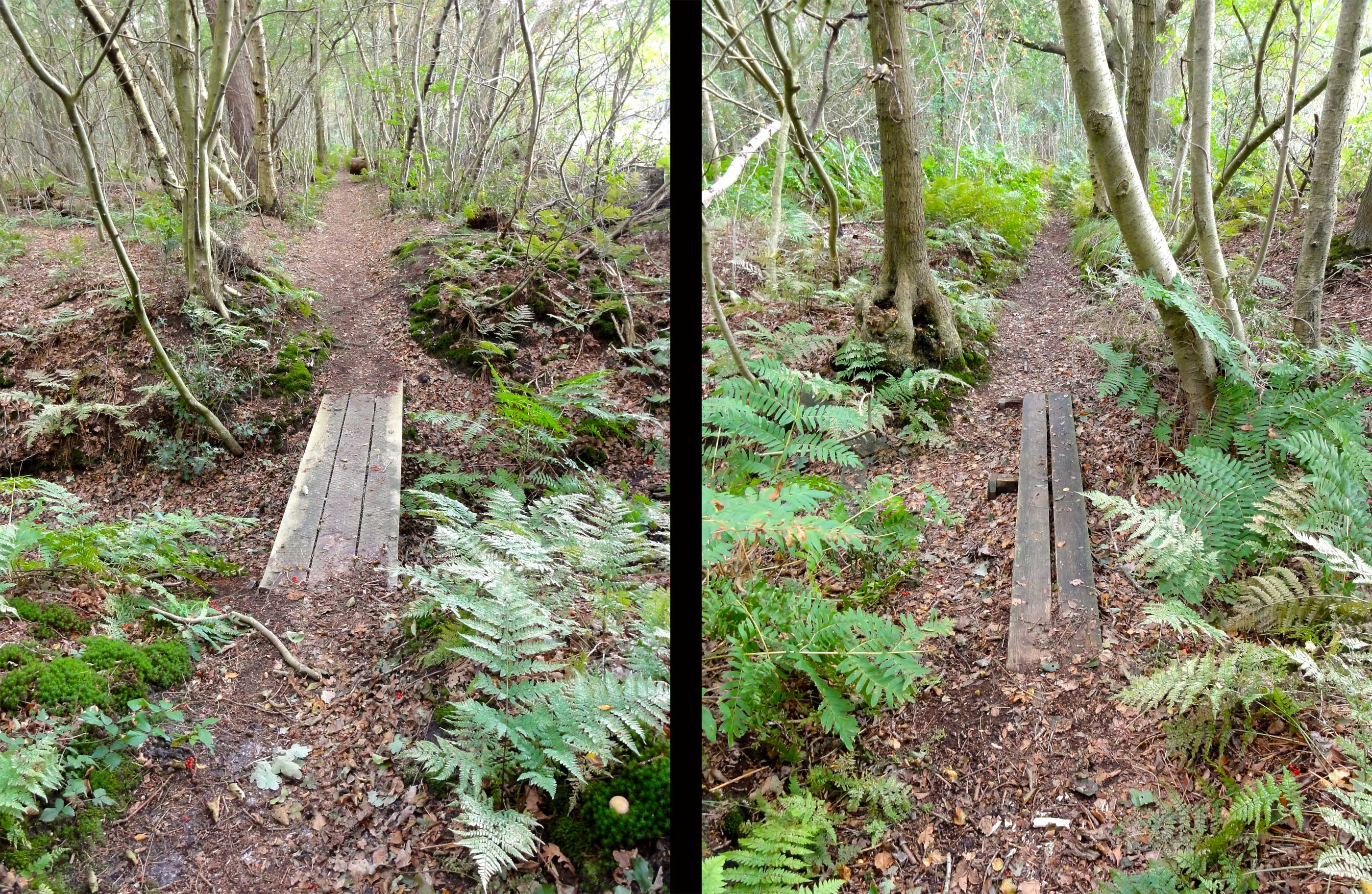 Pad met 'rabatten' in het Lycklamabosch